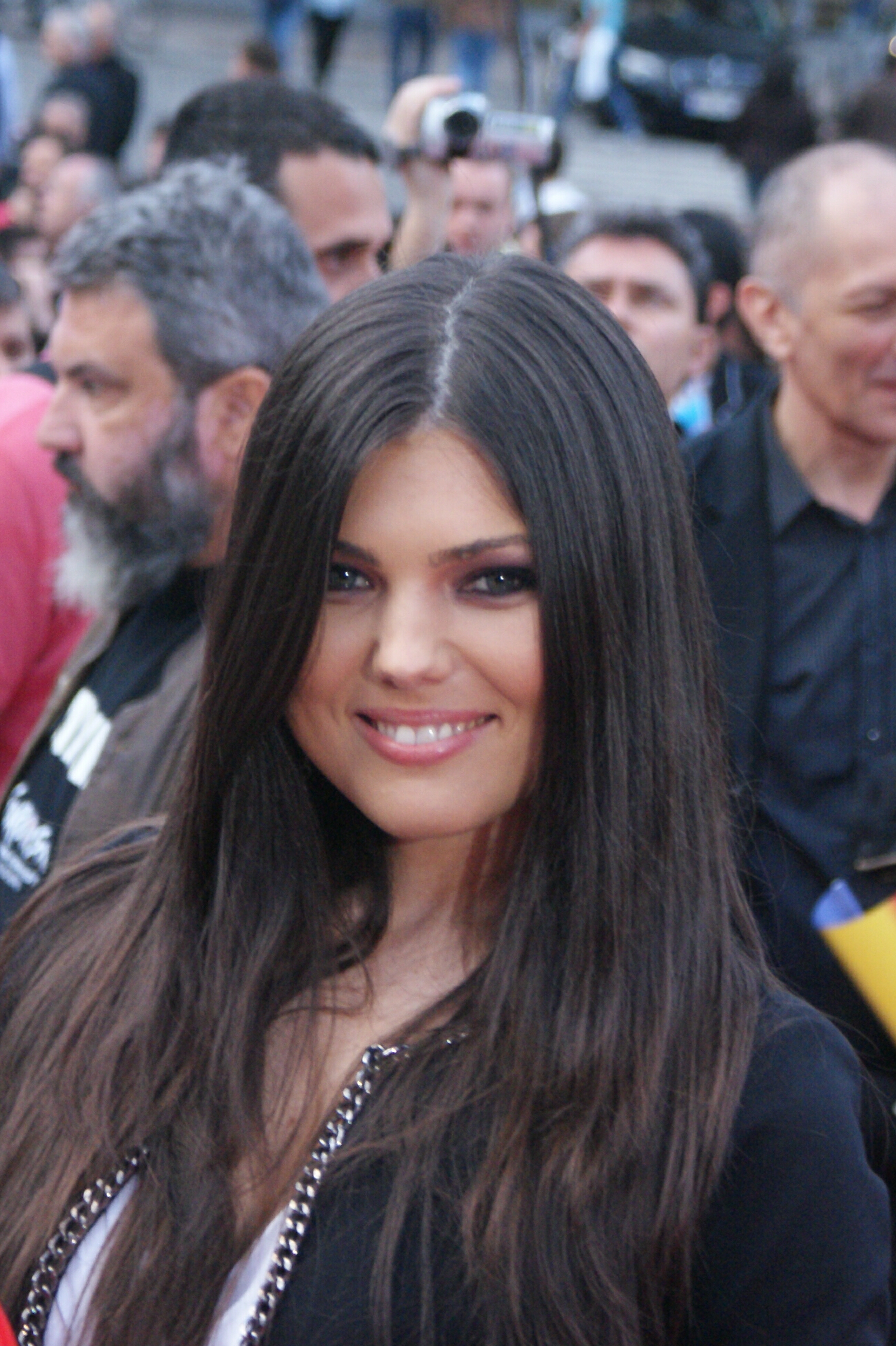 Paula Seling